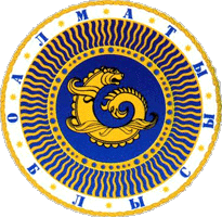 герб Алматинской области